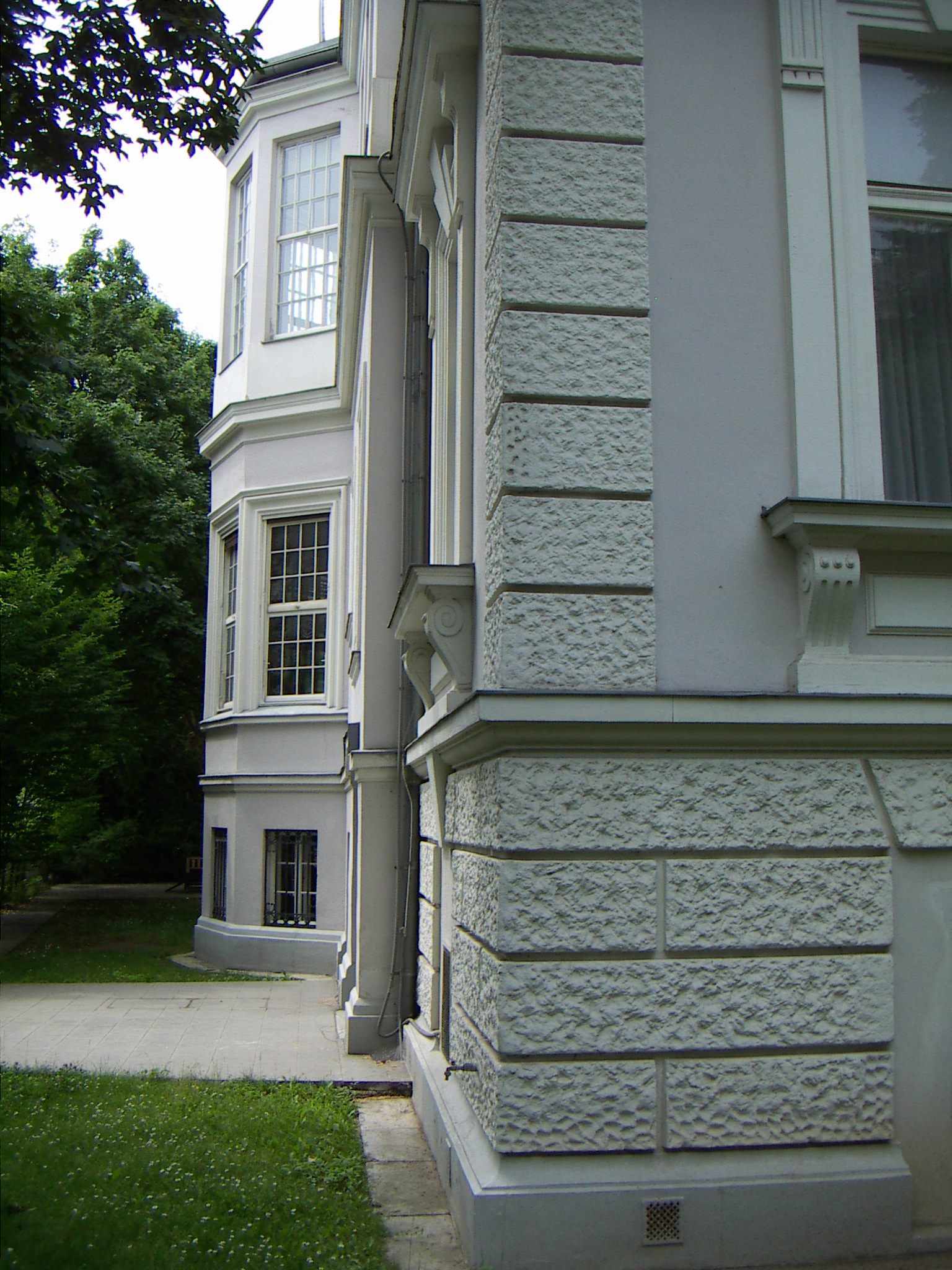 Villa Hohenfels Südfassade Detail